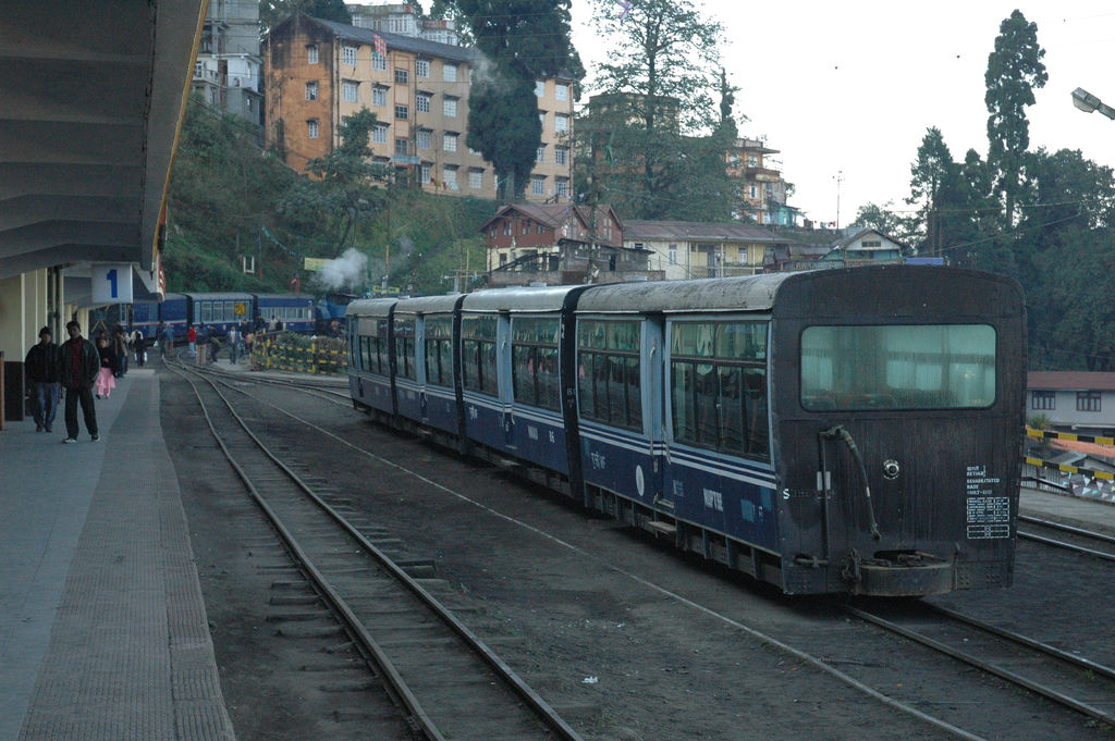 Darjeeling Himalayan Railway Passenger car